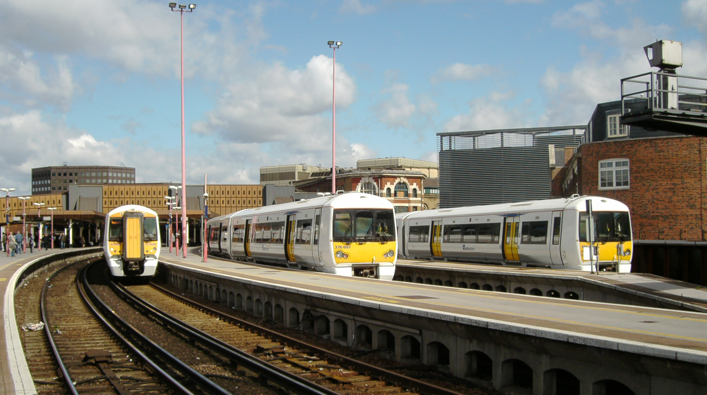 Züge von Southeastern im Bahnhof London Bridge (Durchgangsgleise, Blickrichtung Westen)